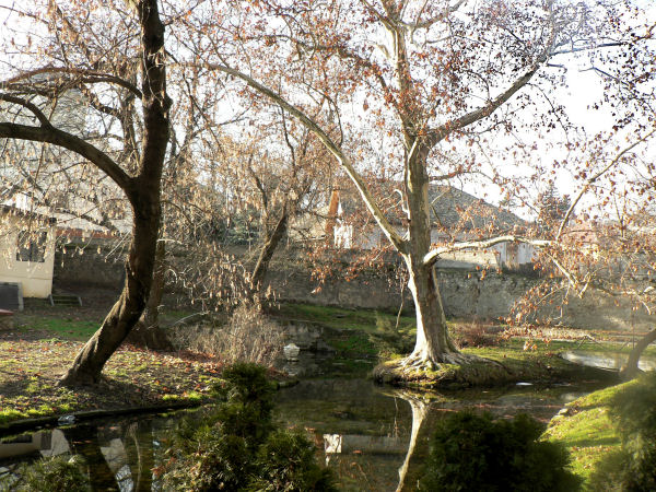 Zárdakert